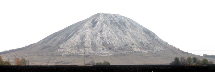 священная гора Торатау в Ишимбайском районе Башкортостана